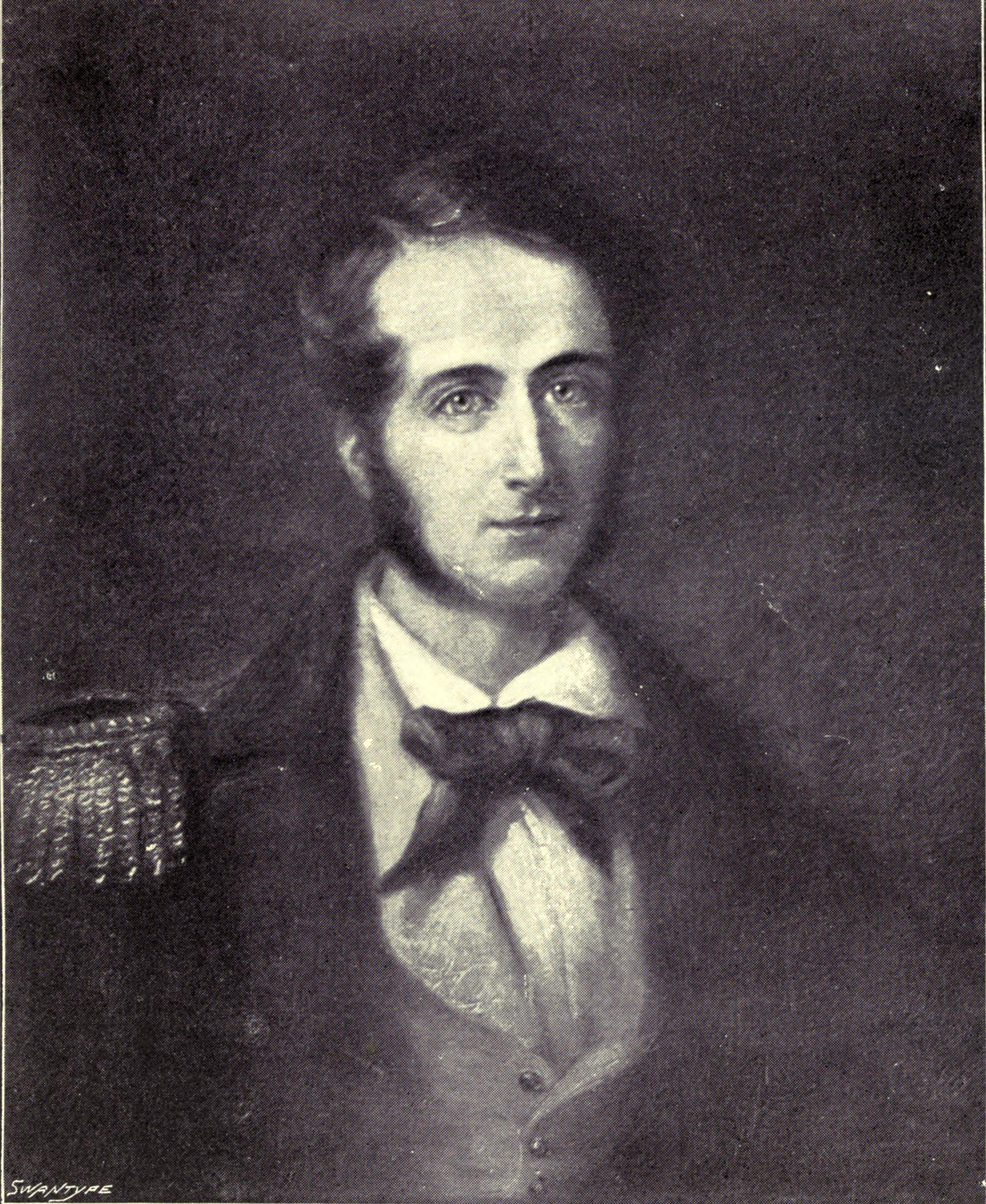 Lieutenant William Robert Mends